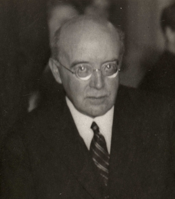 Den norske politikeren og finansministeren Paul Ernst Wilhelm Hartmann (1878-1974)